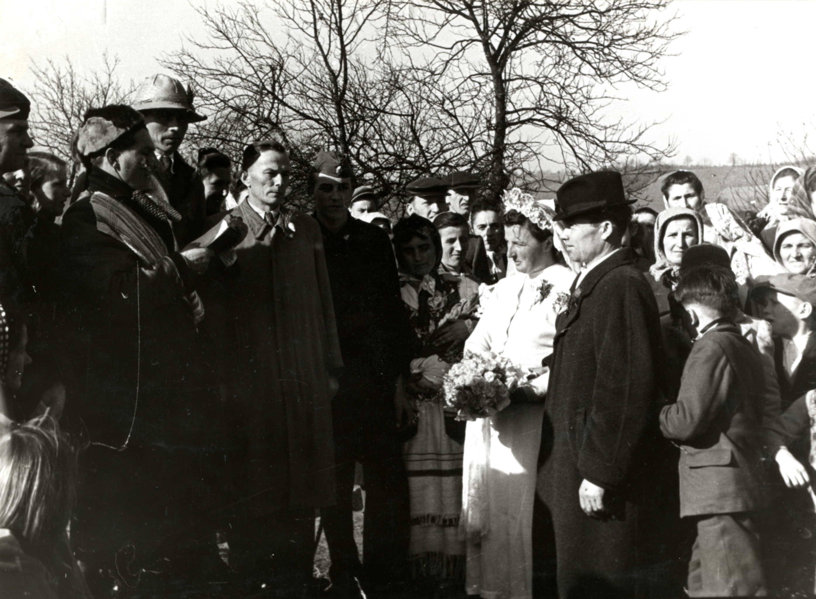 Poroka z borom.